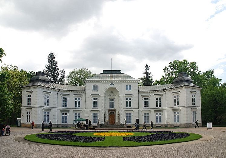 Pałac Myślewicki w Łazienkach Królewskich, Warszawa